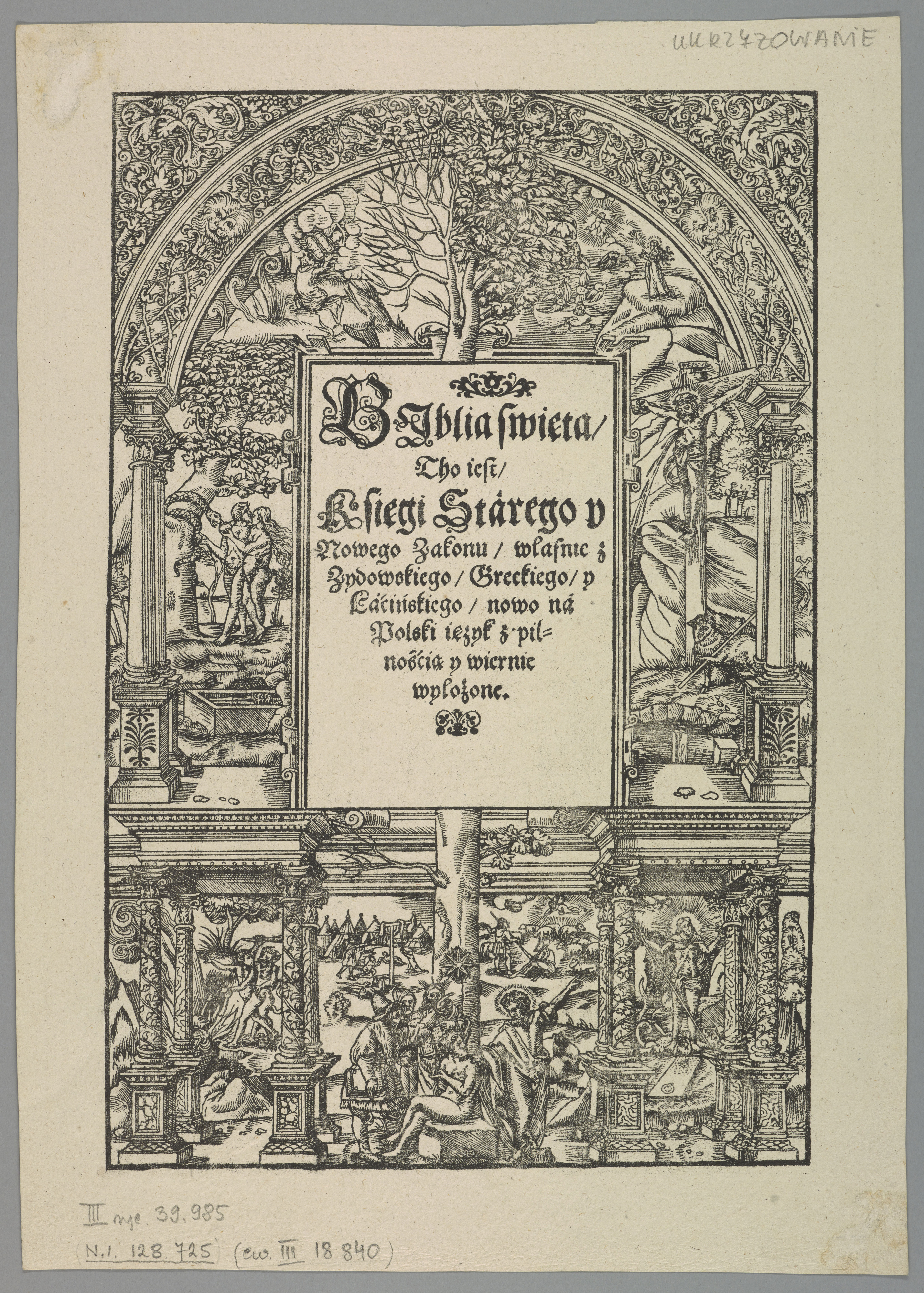 Беларуская (тарашкевіца): Берасьцейская Біблія (Bieraściejskaja Biblija). Тытульная старонка